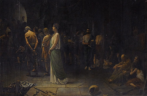 ¡A las fieras!, óleo sobre lienzo, 300 x 500 cm, firmado, 1887 (en dep. en el Ayuntamiento de Granada) [P6516]